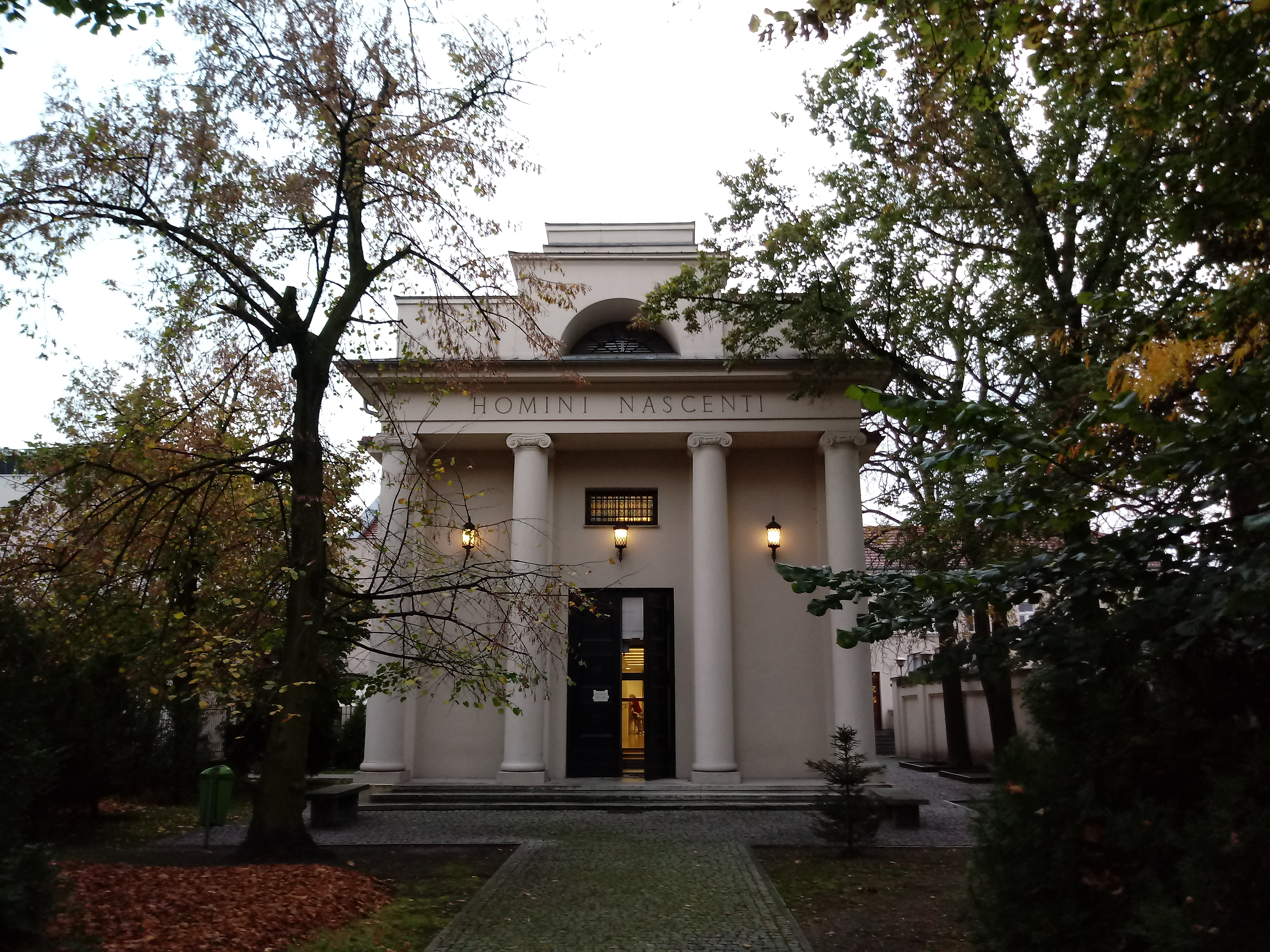 Kaplica klasztorna Karmelitanek Bosych, ul. Niegolewskich, Poznań - Łazarz